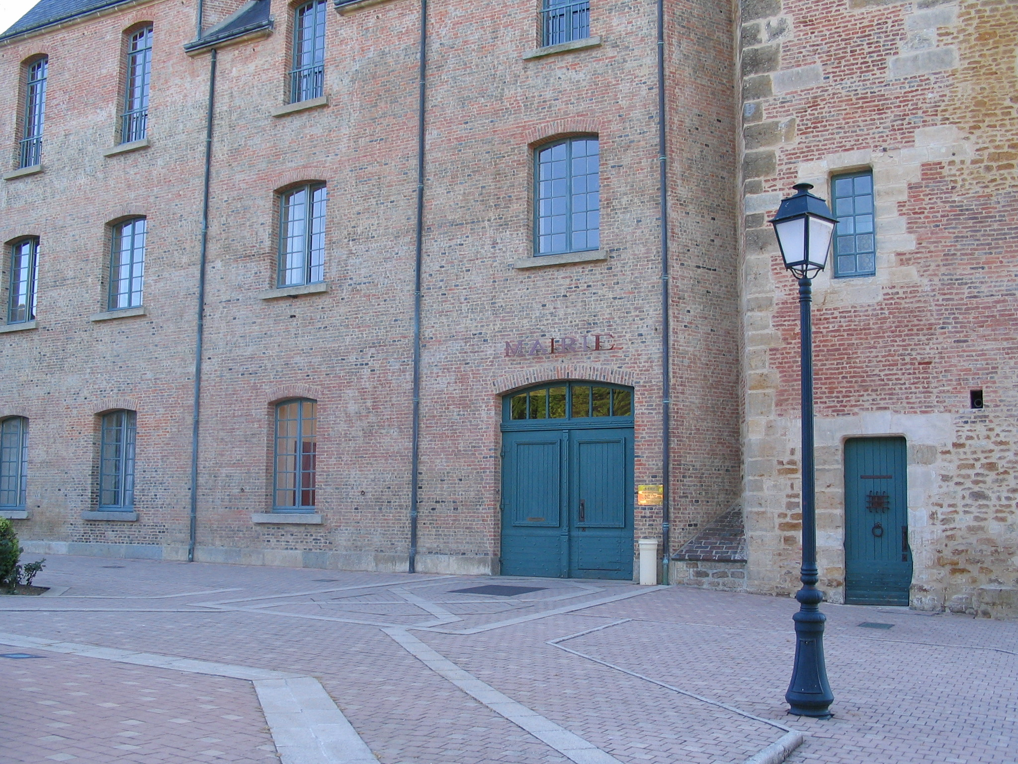 château des 12ème et 16ème siècles, en pierre et briques rouges (Gacé,,Orne, France)